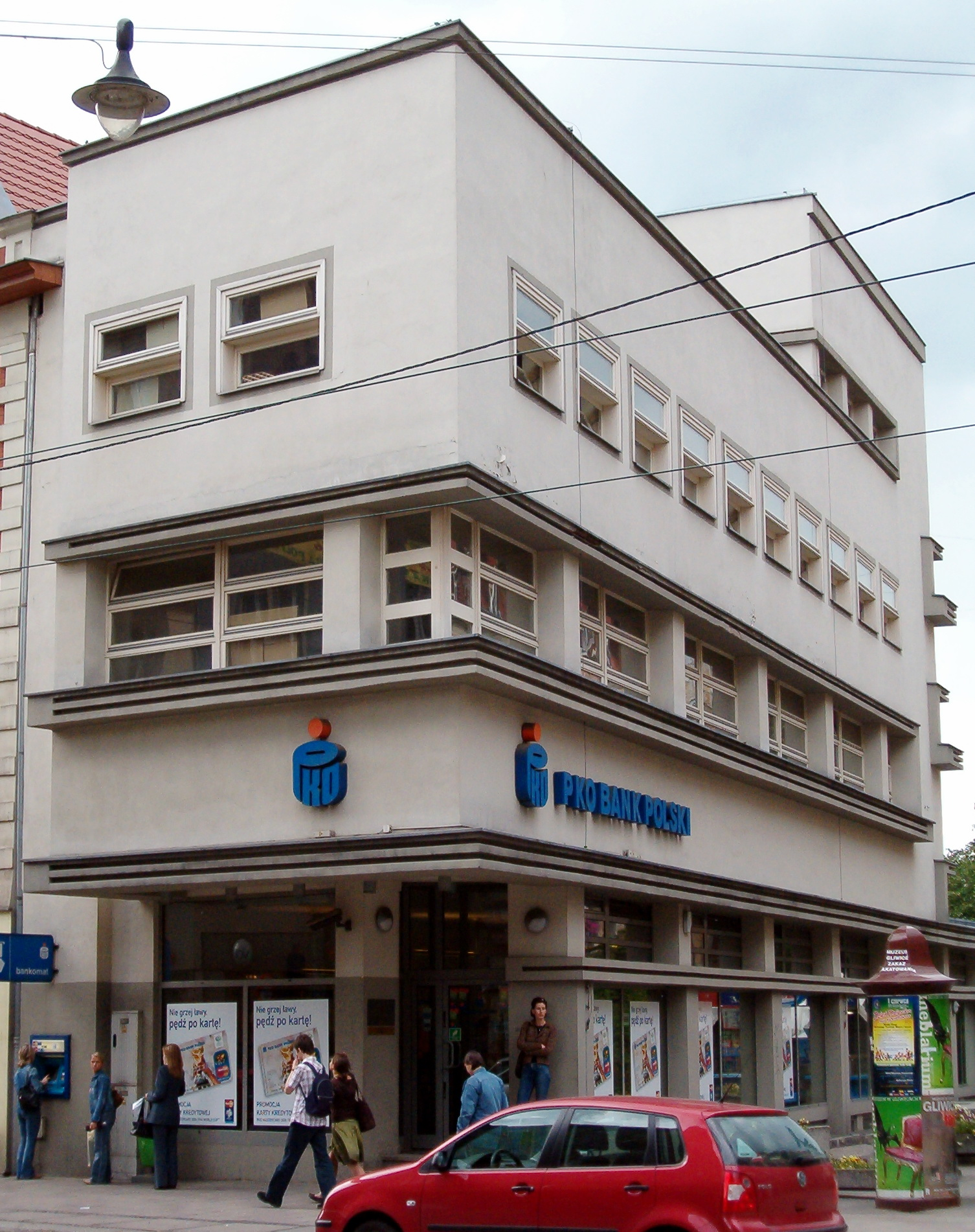 Gliwice, ul. Zwycięstwa 37 - dawny "Dom Tekstylny" Weichmanna, zbudowany w latach 1921-22 w stylu funkcjonalizmu (zabytek nr A/1376/88 z 27.09.1988).